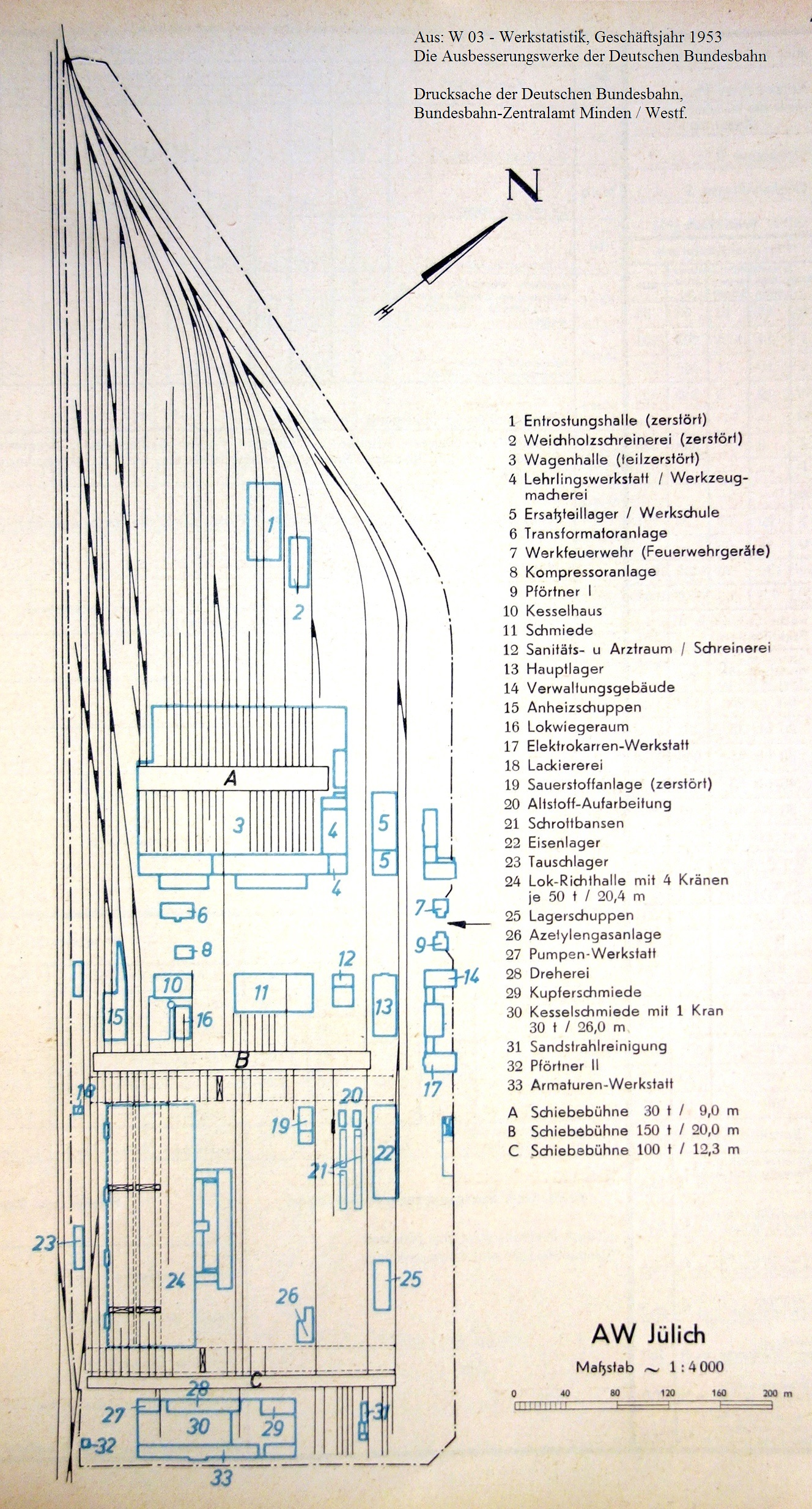 Lageskizze des Bundesbahn-Ausbesserungswerks Jülich 1953.